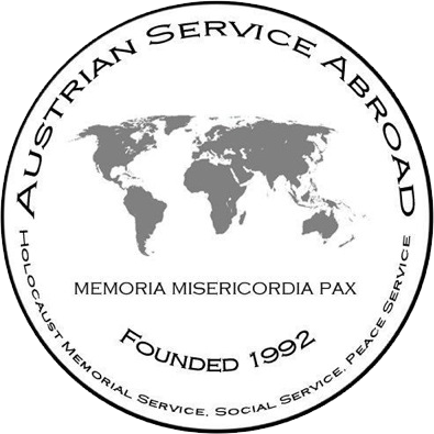 Siegelbild des Vereins Österreichischer Auslandsdienst